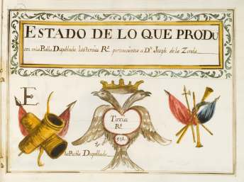 Documentación del Catastro de Ensenada, s. XVIII (AHP Guadalajara)